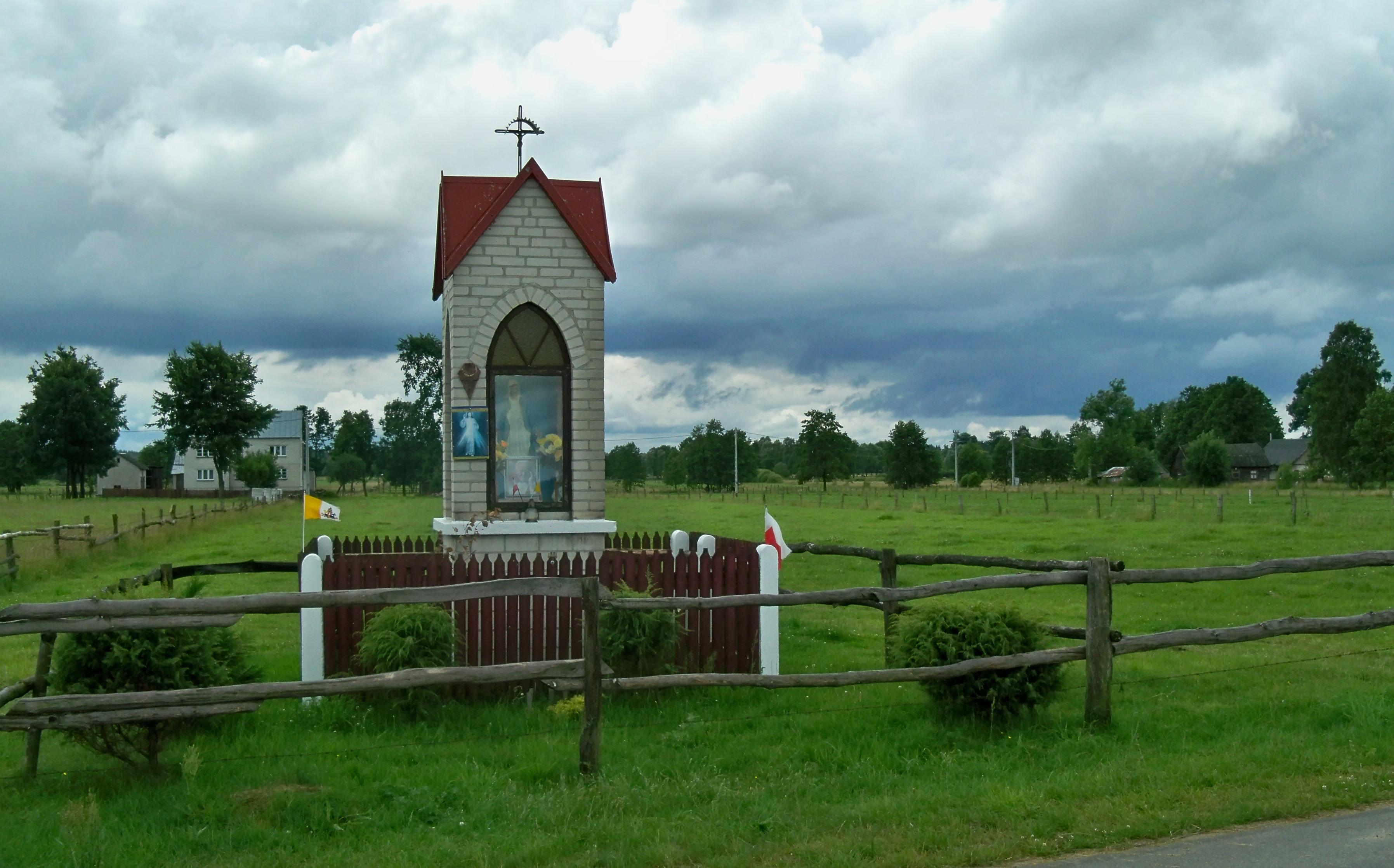 Dąbrowy Pierwsze k. Myszyńca, przysiółek Gównicha.